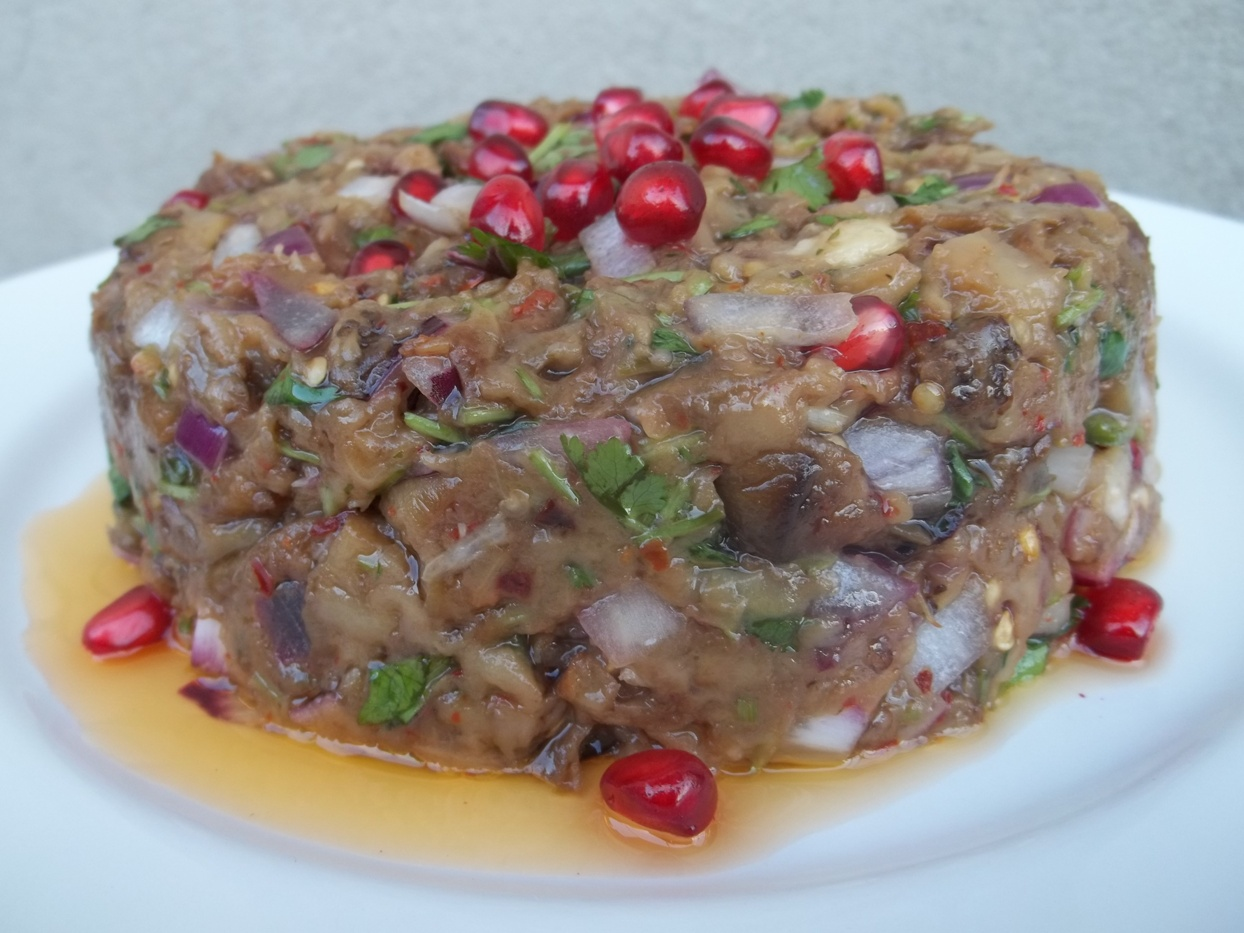 Баклажанная икра с гранатом